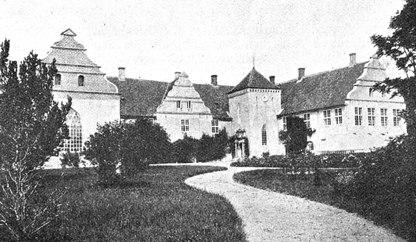 Løgismose er en gammel sædegård, den nævnes første gang i 1333. Løgismose ligger i Hårby Sogn, Båg Herred, Haarby Kommune. Hovedbygningen er opført i 1575 og ombygget i 1640-1644-1726-1826-1883.